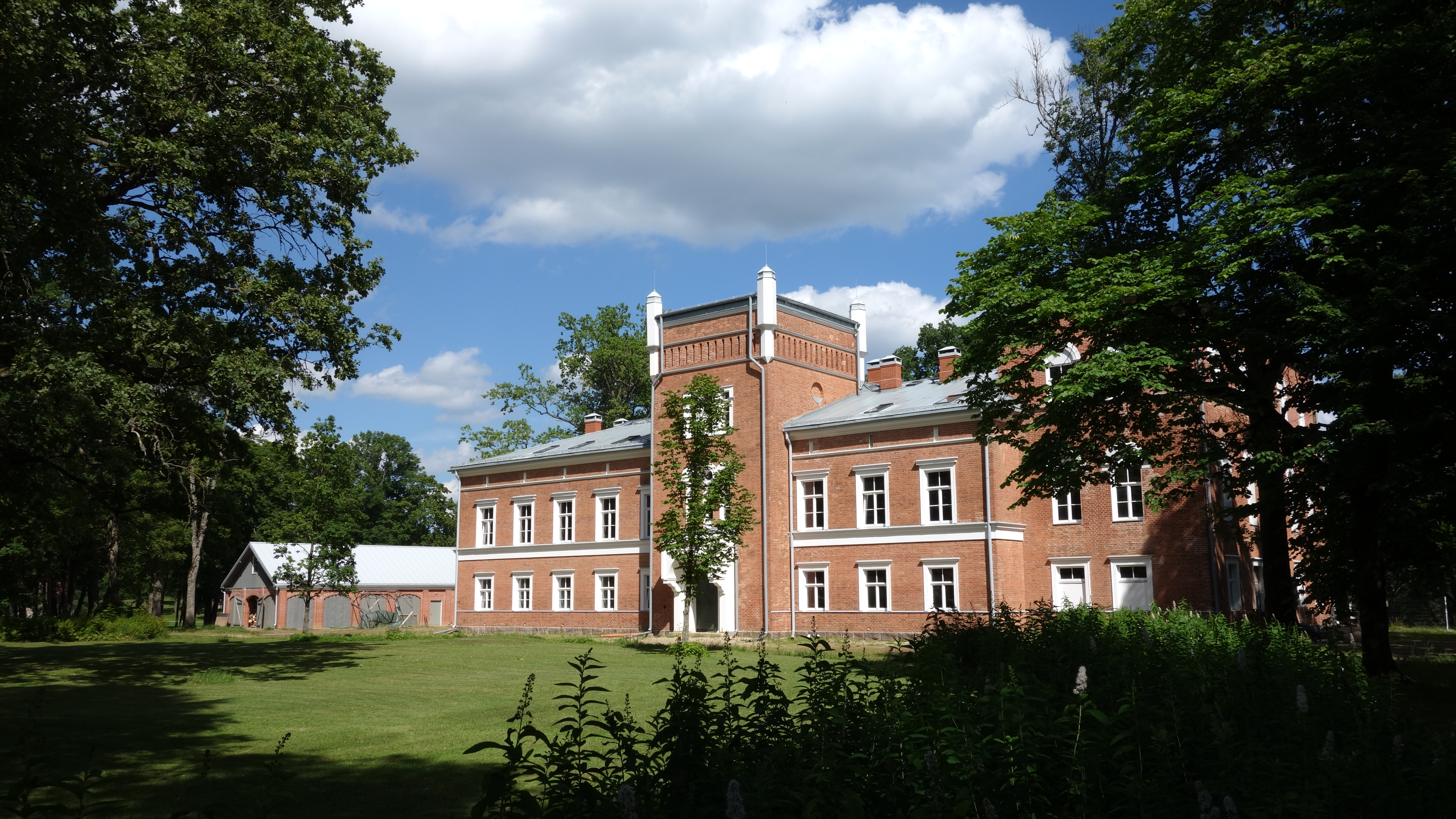 Jumurda mõisa peahoone 2015. aastal.